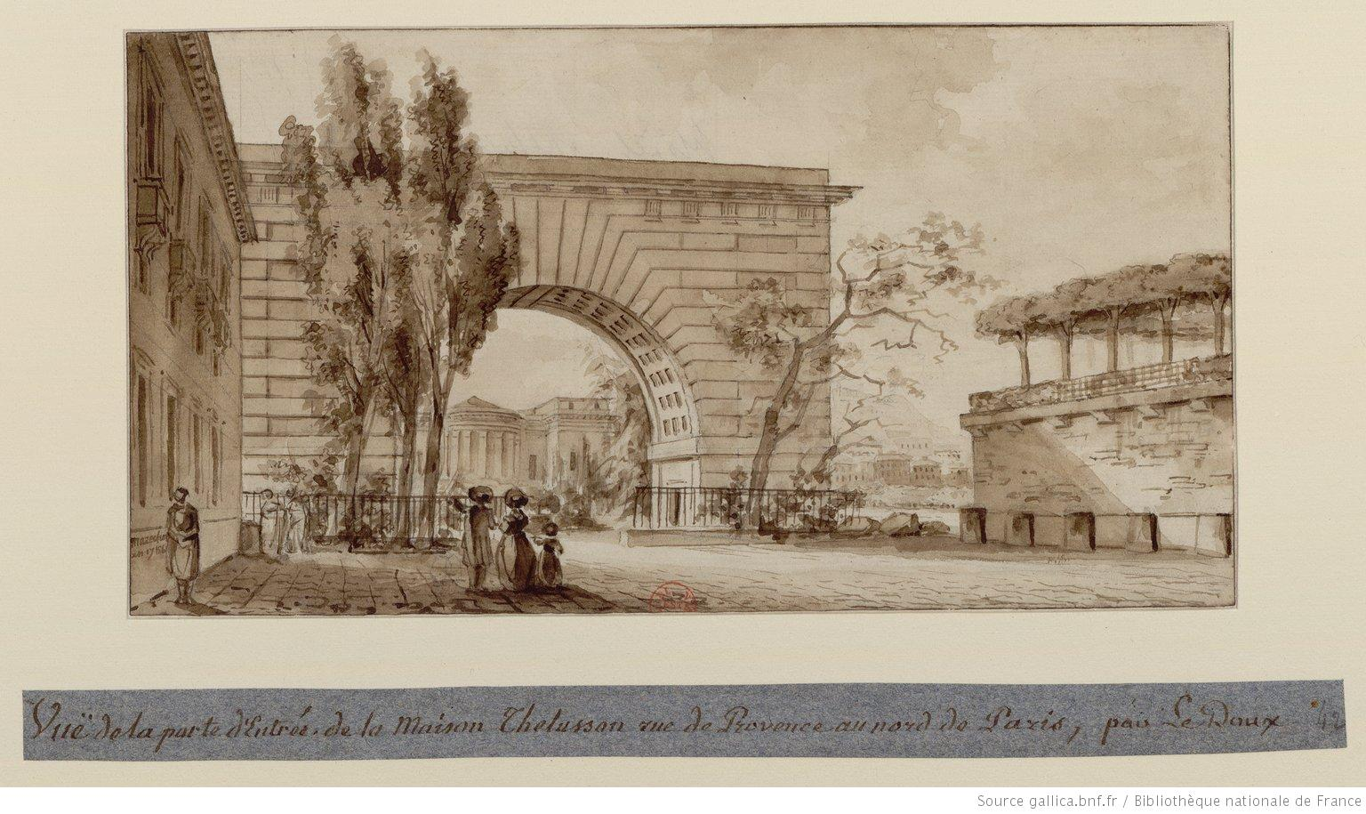 Vue de la porte d'entrée de la Maison Thellusson, rue de Provence au nord de Paris